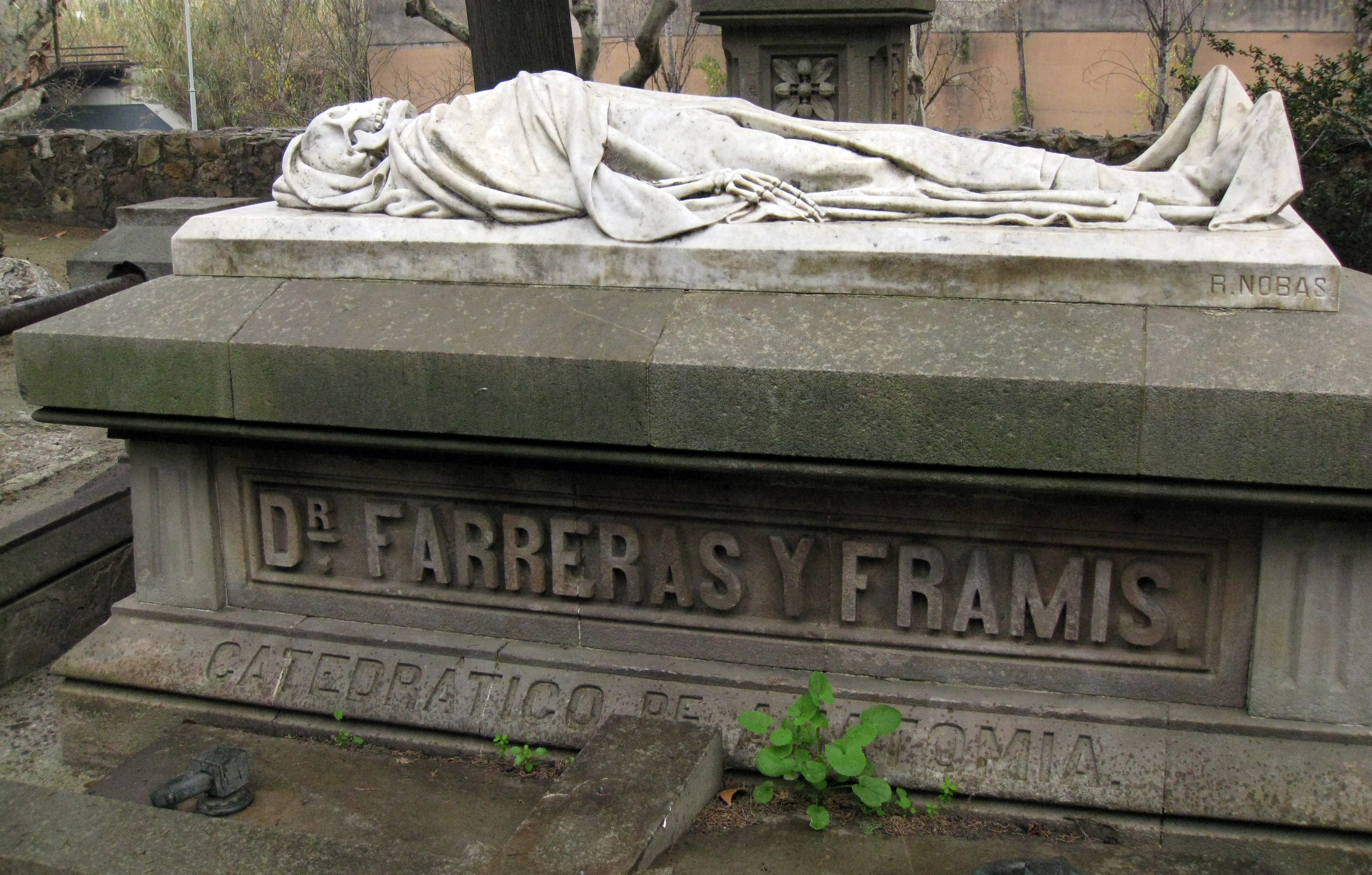 Cementiri de Montjuïc (Barcelona) Object location41° 21′ 10.13″ N, 2° 09′ 06.51″ E